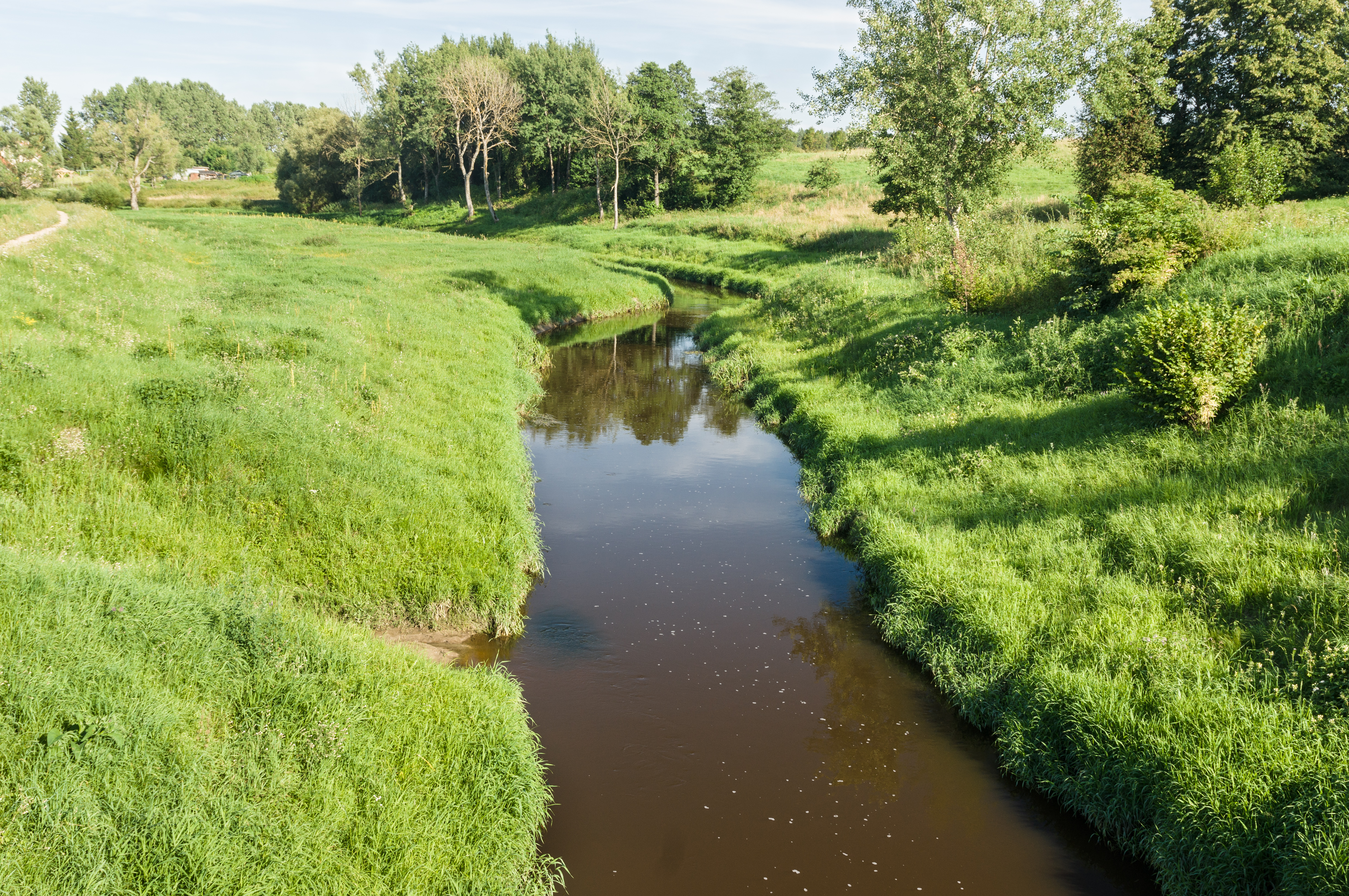 Drwęca Warmińska w Krośnie (pow. lidzbarski).